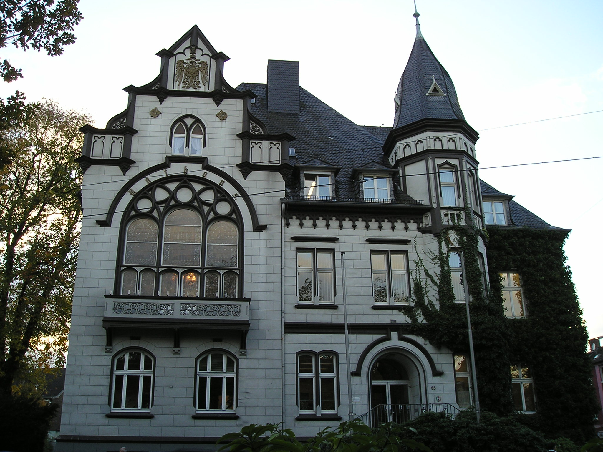 Altes Rathaus, Haan